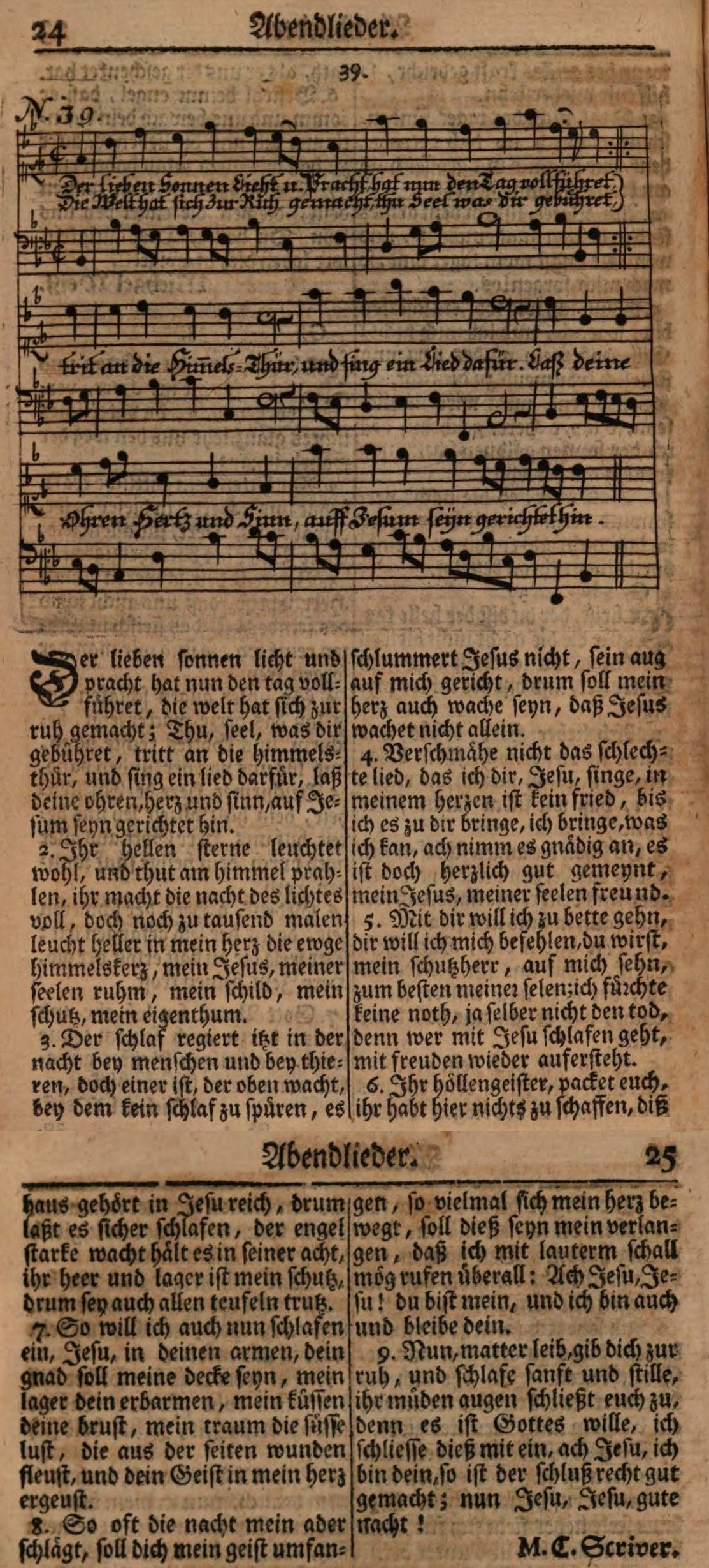 Der lieben Sonne Licht und Pracht mit Bachs Harmonisierung (BWV 446) in Schemellis Gesangbuch